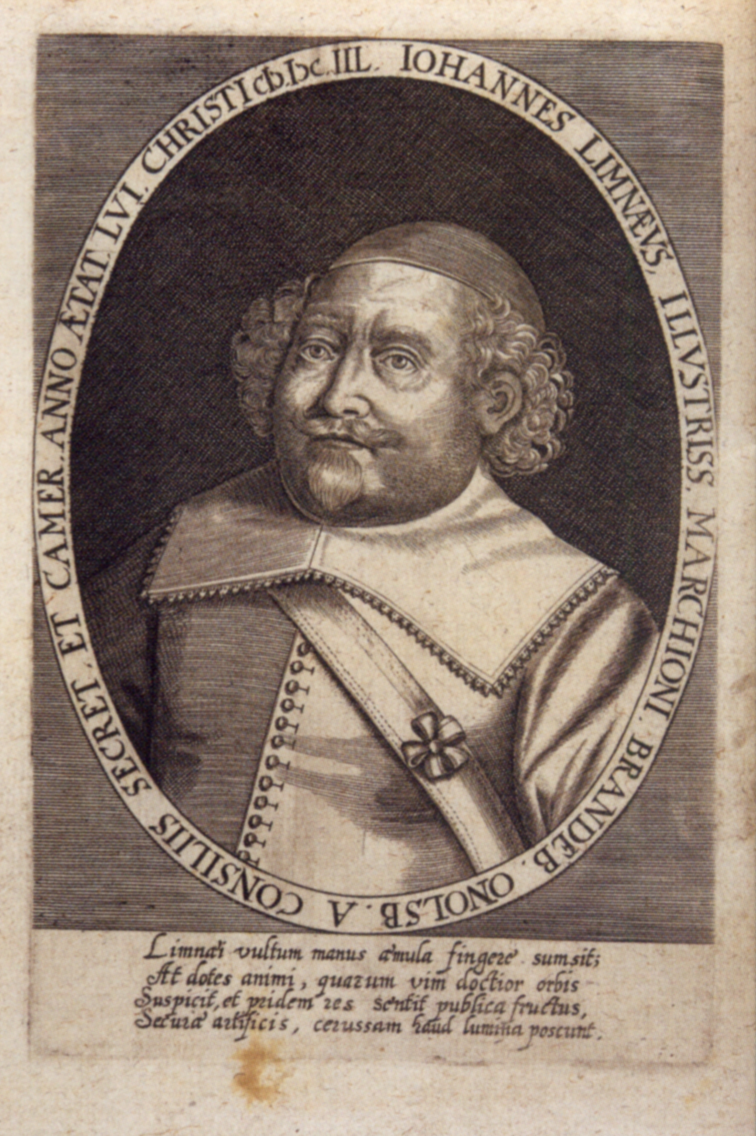 aus Tomus quartus (?) Iuris publici imperii romano-germanici, Fürstliche Kunstsammlungen Waldburg-Wolfegg